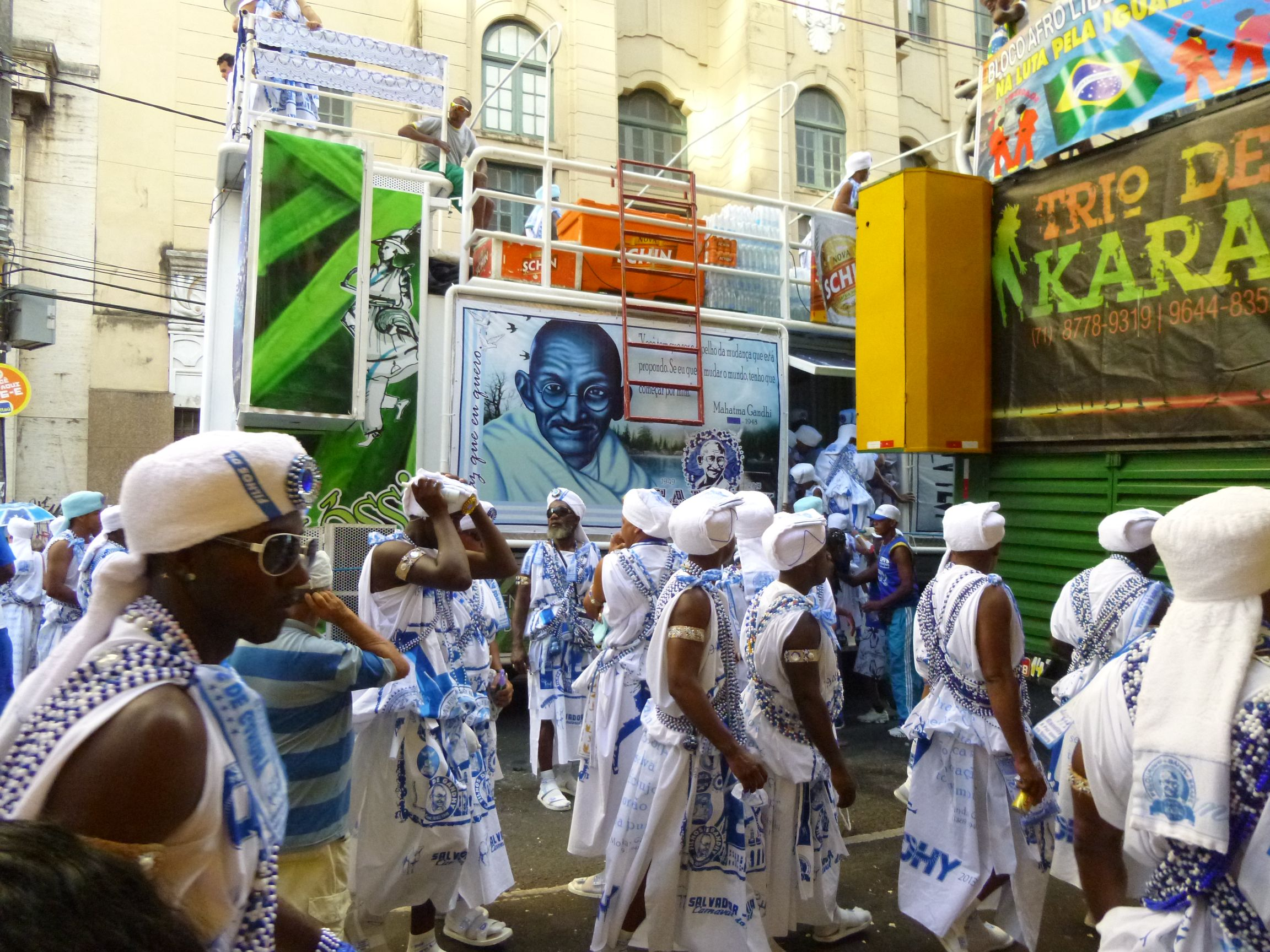 Filhos de Gandhy Karneval 2013 Salvador Bahia